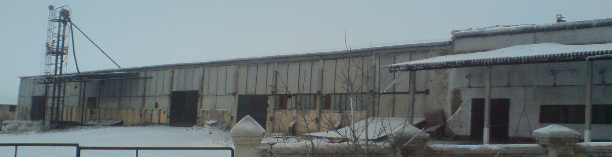 Міжрайсклад